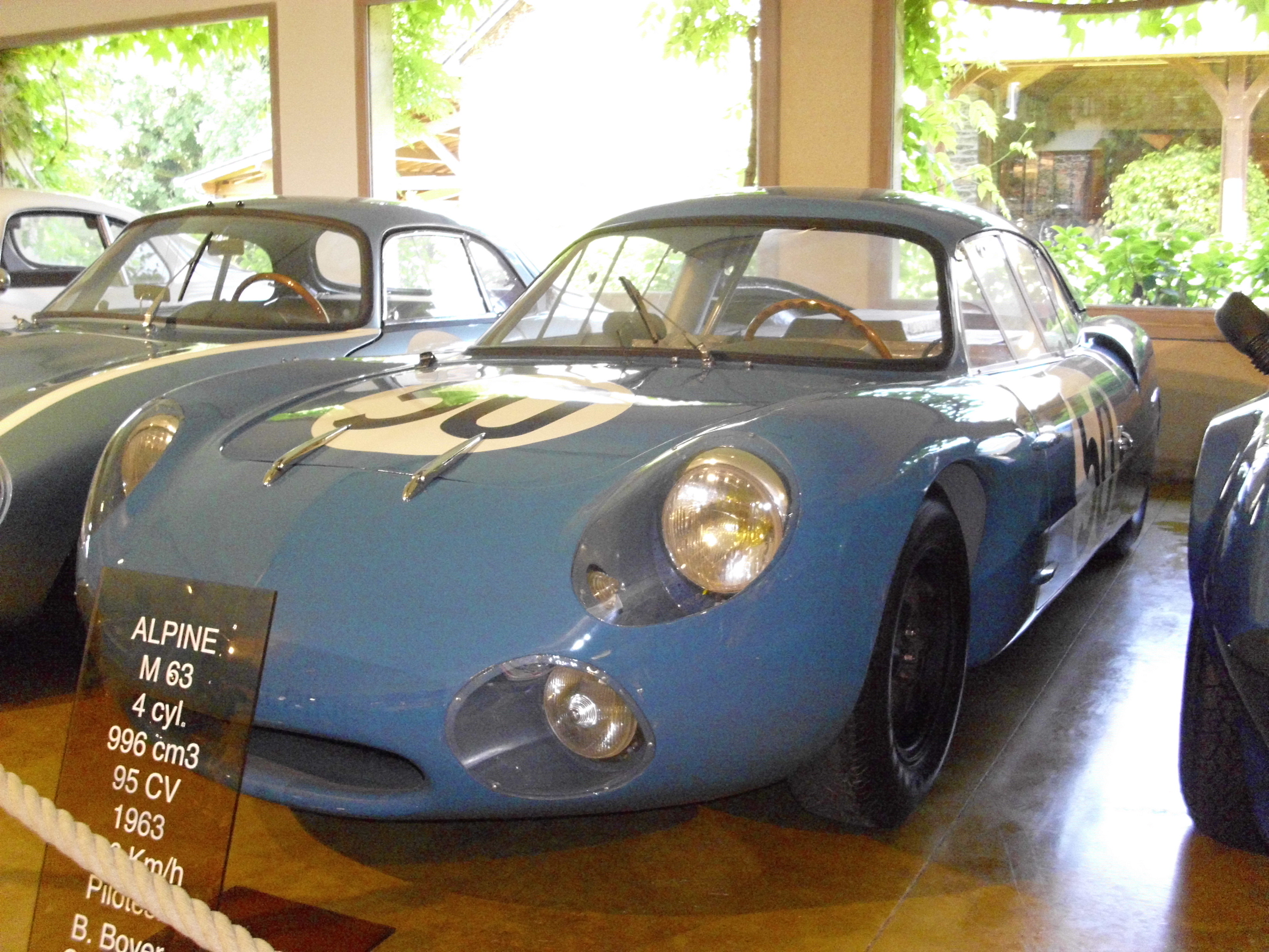 Alpine M 63 1963